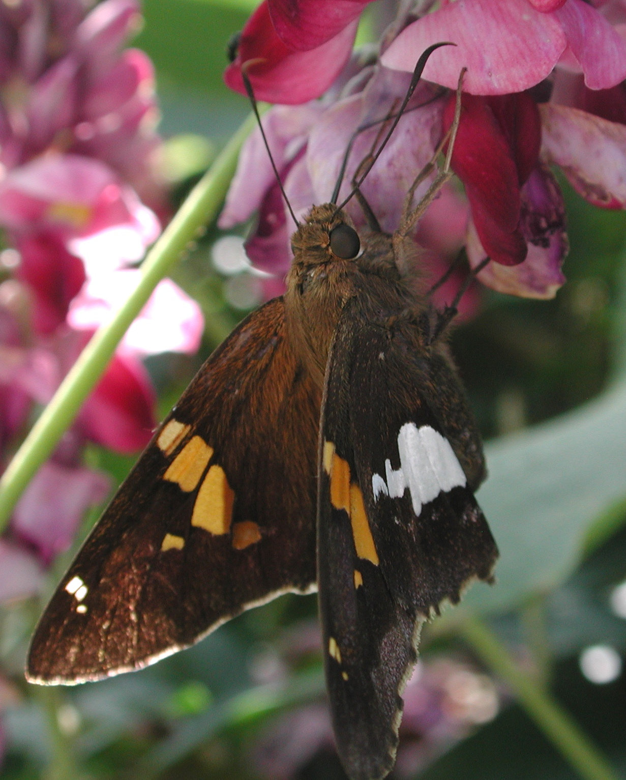 Silver spotted skipper Epargyreus clarus on kudzu